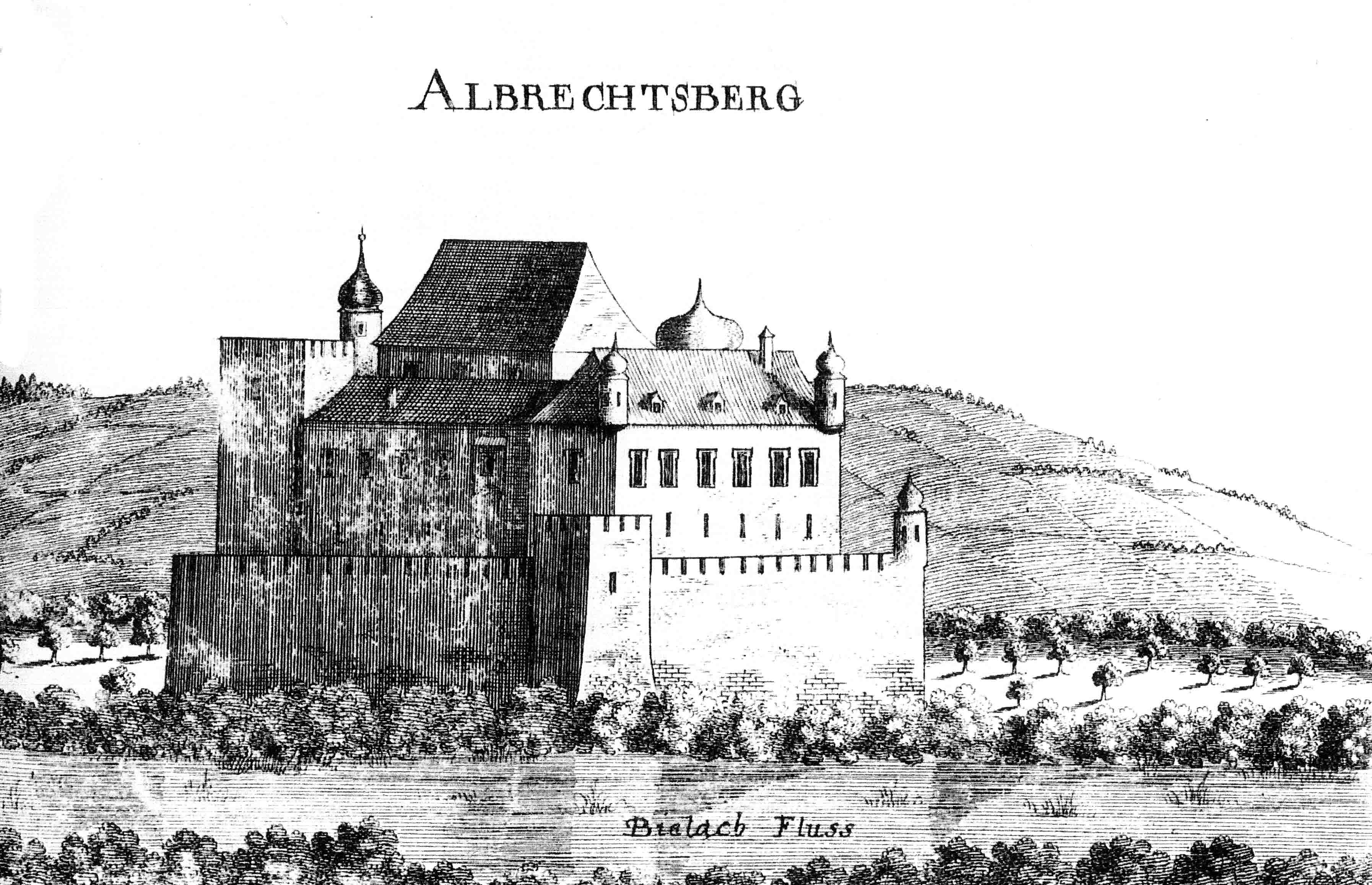 Vischer-Stich der Burg Albrechtsberg um 1672